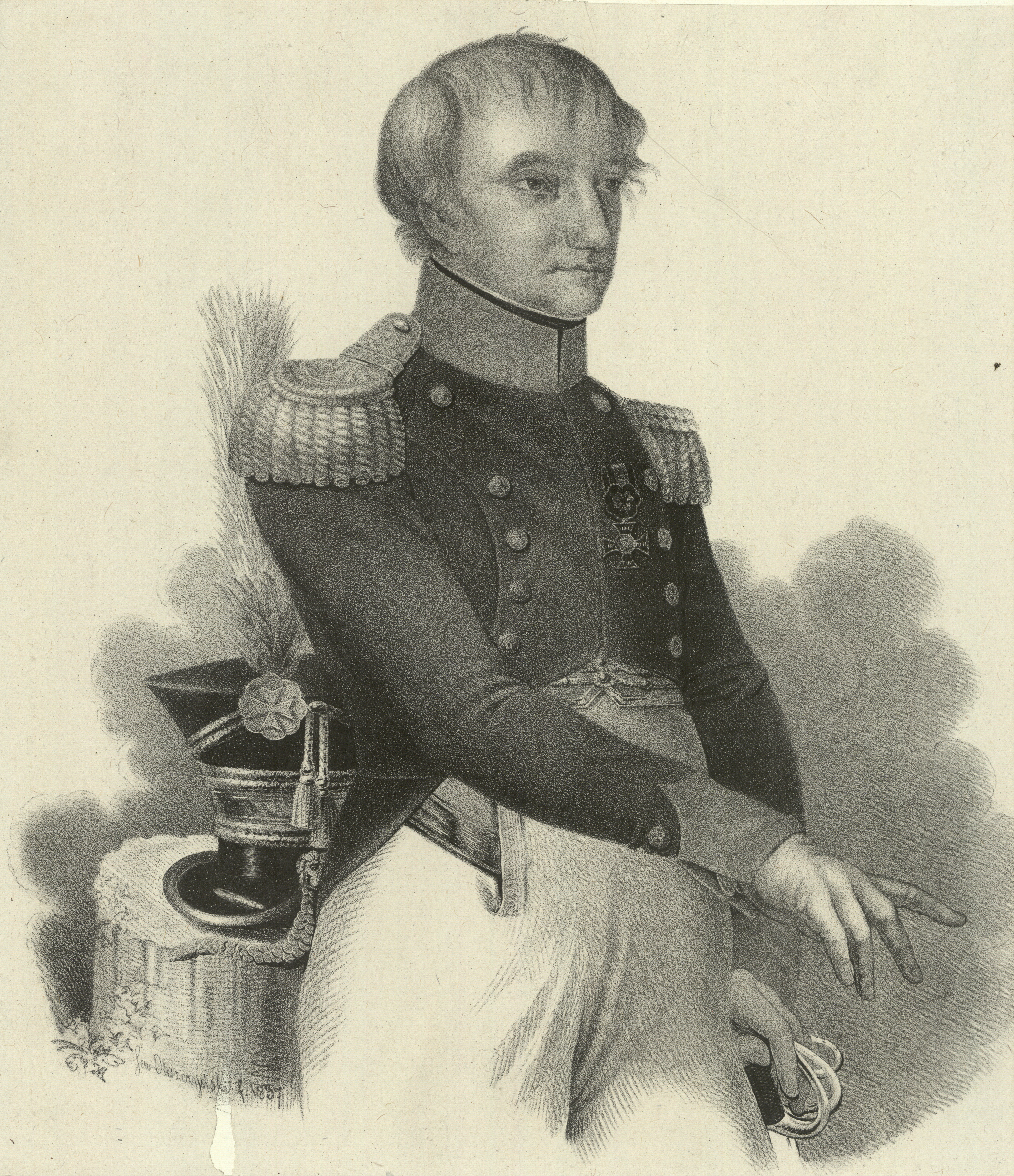 Kazimierz Rozwadowski